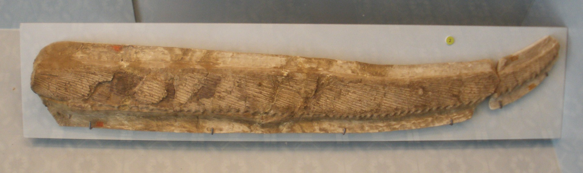 Fossil of Protosphyraena, an extinct fish Took the photo at Musee d'Histoire Naturelle, Brussels